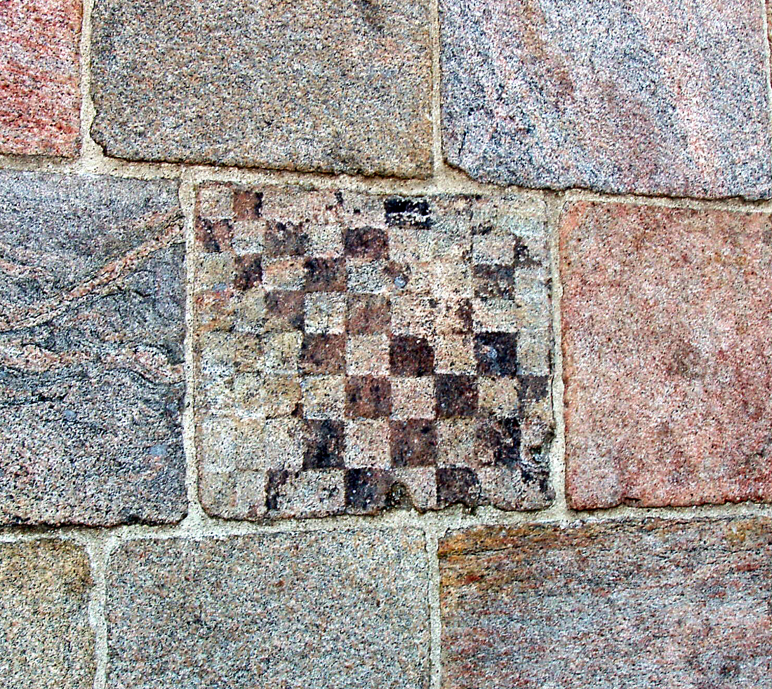 Granitkvadre med skaktern Nørbæk Kirke, Nørbæk Sogn (Nørbeg) sydvest for Fårup, i Randers Kommune, Jylland, Denmark